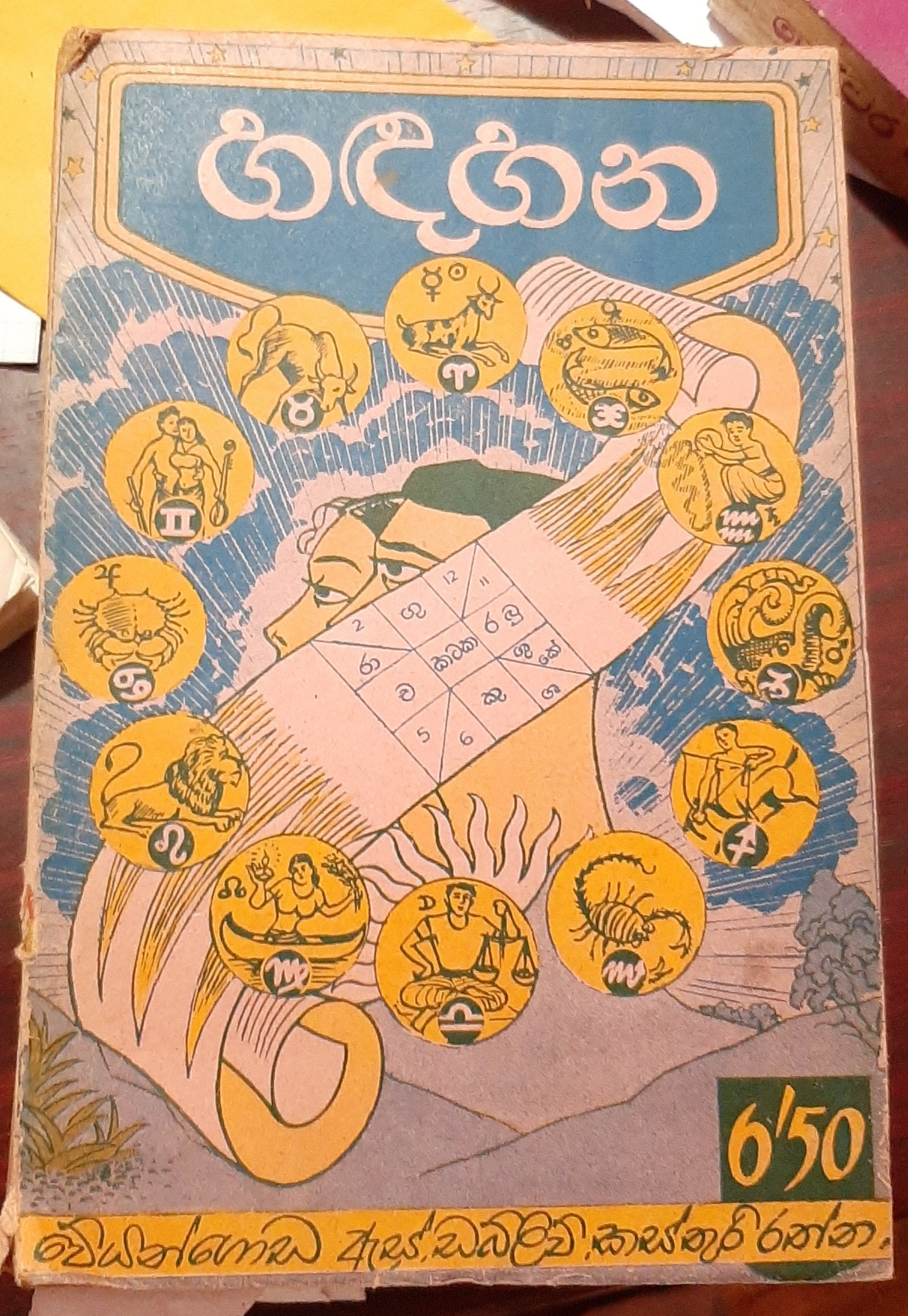 සිංහල: මෙය එස්. ඩබ්ලිව්. කස්තුරිරත්න විසින් රචිත හඳහන - ප්‍රථම භාගය නම් සිංහල පොතේ පළමු ප්‍රකාශනයේ පොත් කවරයේ ඡායාරූපයකි. එකල එය අලෙවි කර ඇත්තේ රු. 6 ශත 50 කට වේ. දැනට එහි පිටපත් ඉතාමත් සුළු ප්‍රමාණයක් පමණක් ඉතිරිව ඇත.